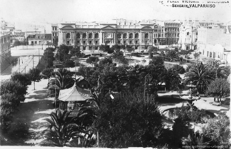 Plaza Victoria (adelante) y Plaza Simón Bolívar (atrás) de Valparaíso, Chile. Años 1920. Al fondo se aprecia la Biblioteca Santiago Severín.